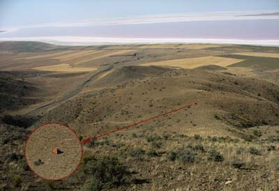 Šator nedaleko od slanog jezera Tuz Golu u centralnoj Turskoj Autor: Iva Čukić, 2006. godina